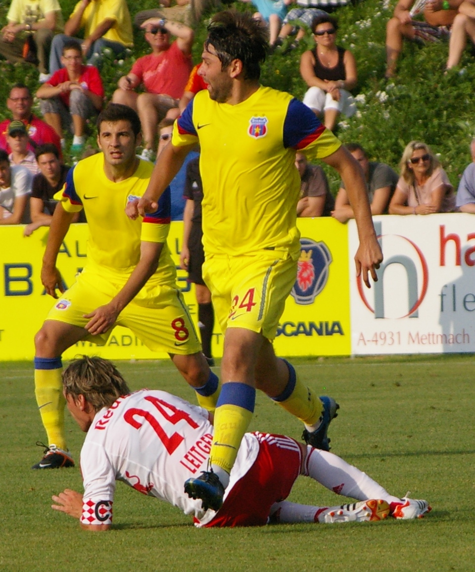 Salzburg gegen Bukarest